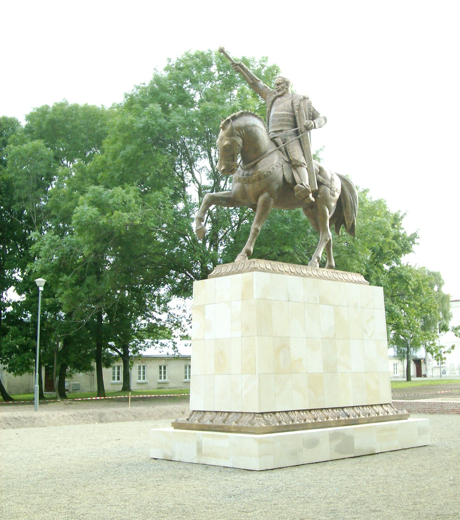 Pomnik Jana Zamoyskiego. Rzeźba Mariana Koniecznego.